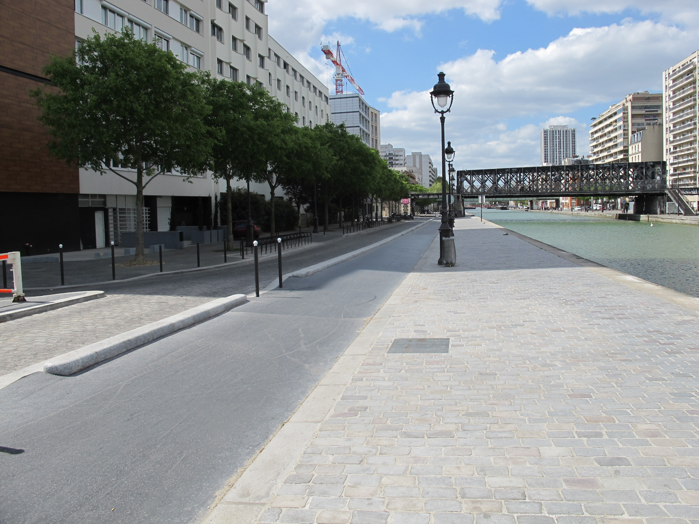 Quai de la Marne, Paris